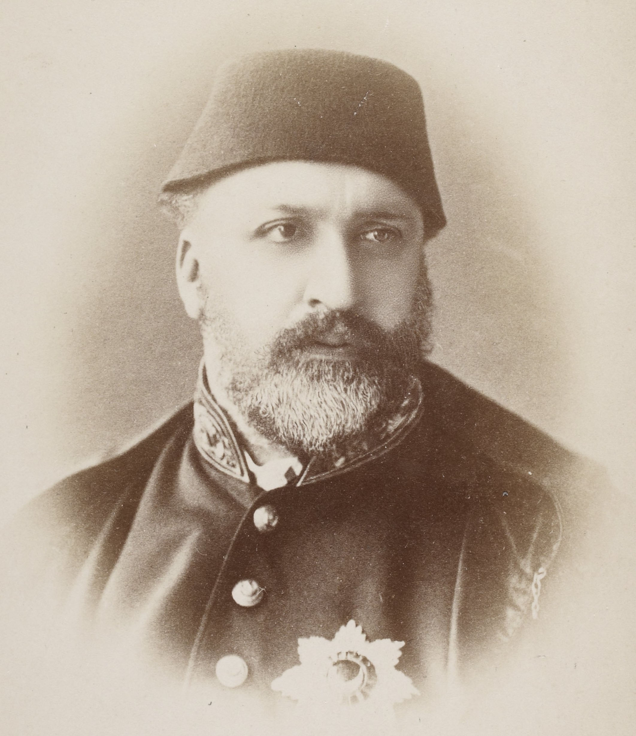 Sultan Abd-ul-Aziz